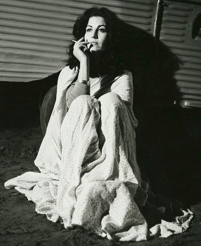 پوری بنایی در نمایی از فیلم مهر گیاه به کارگردانی فریدون گله. 1354